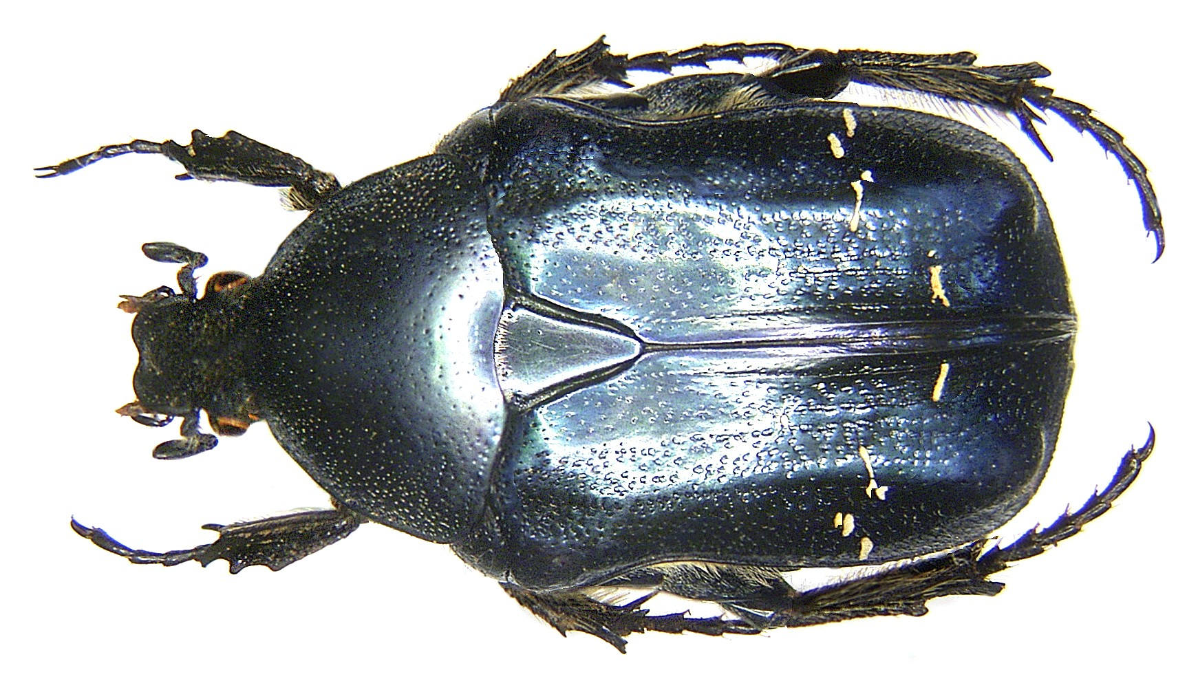 Familie: Scarabaeidae Grösse: 14-20 mm Verbreitung: ganz Europa ohne Iberische Halbinsel Ökologie: Entwicklung im morschen Holz von Laubbäumen und in Humuserde Fundort: Korsika leg. det. U.Schmidt, 1973 Foto: U.Schmidt, 2006